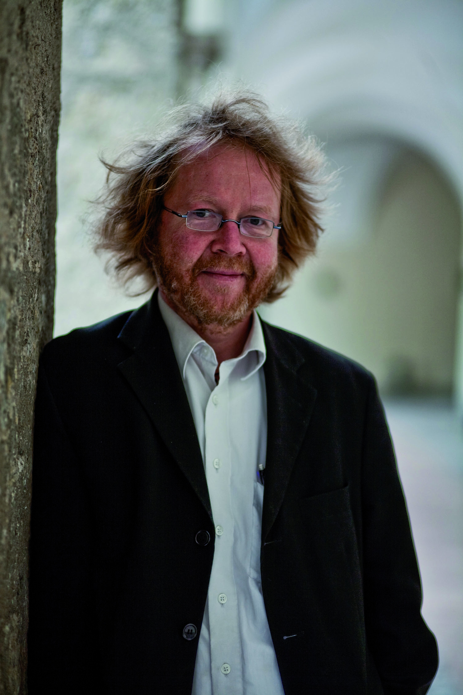 Portrait von Anton Bucher